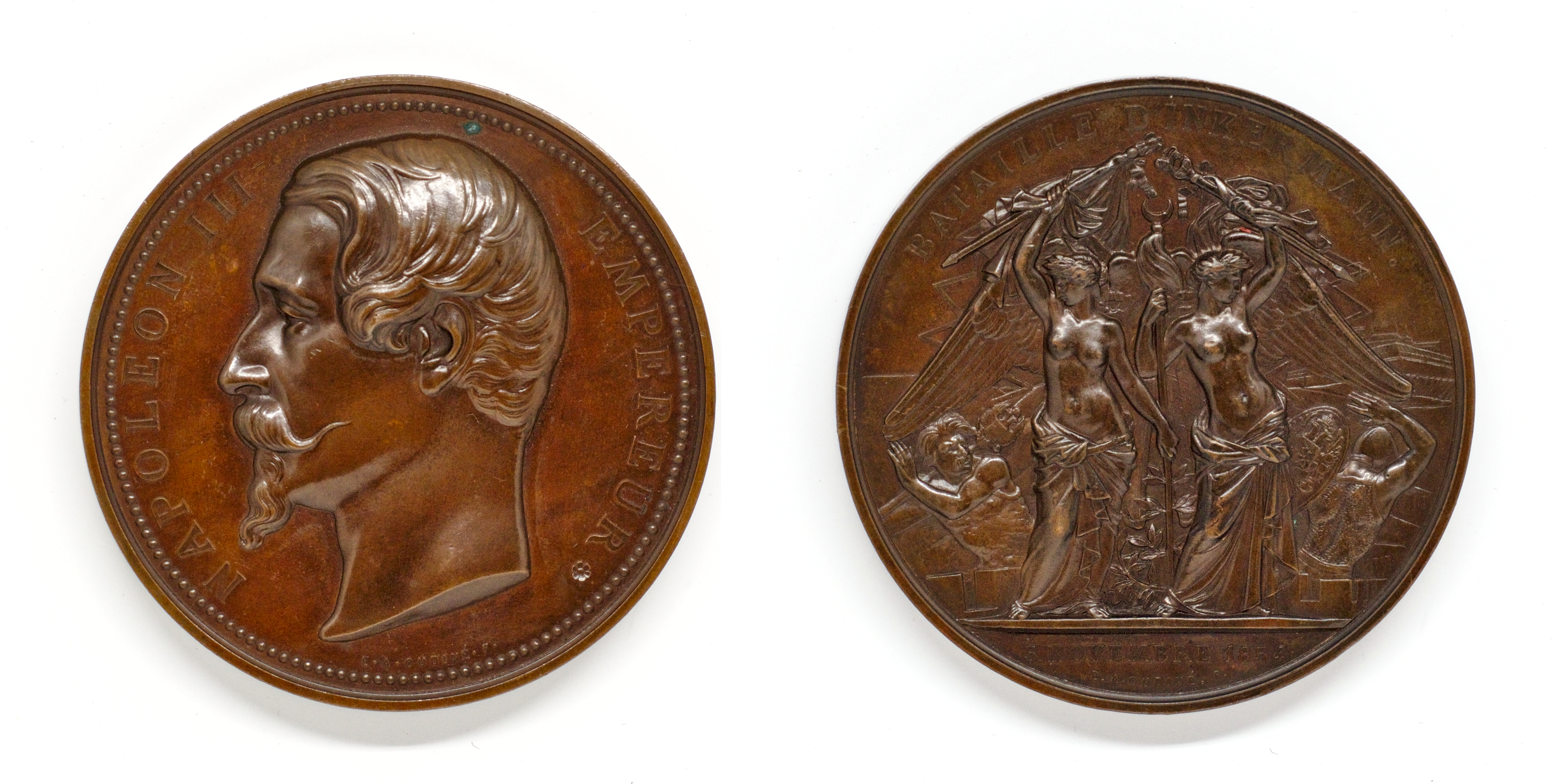 Médaille de Napoléon III - Bataille d'Inkermann - Oudiné 1854